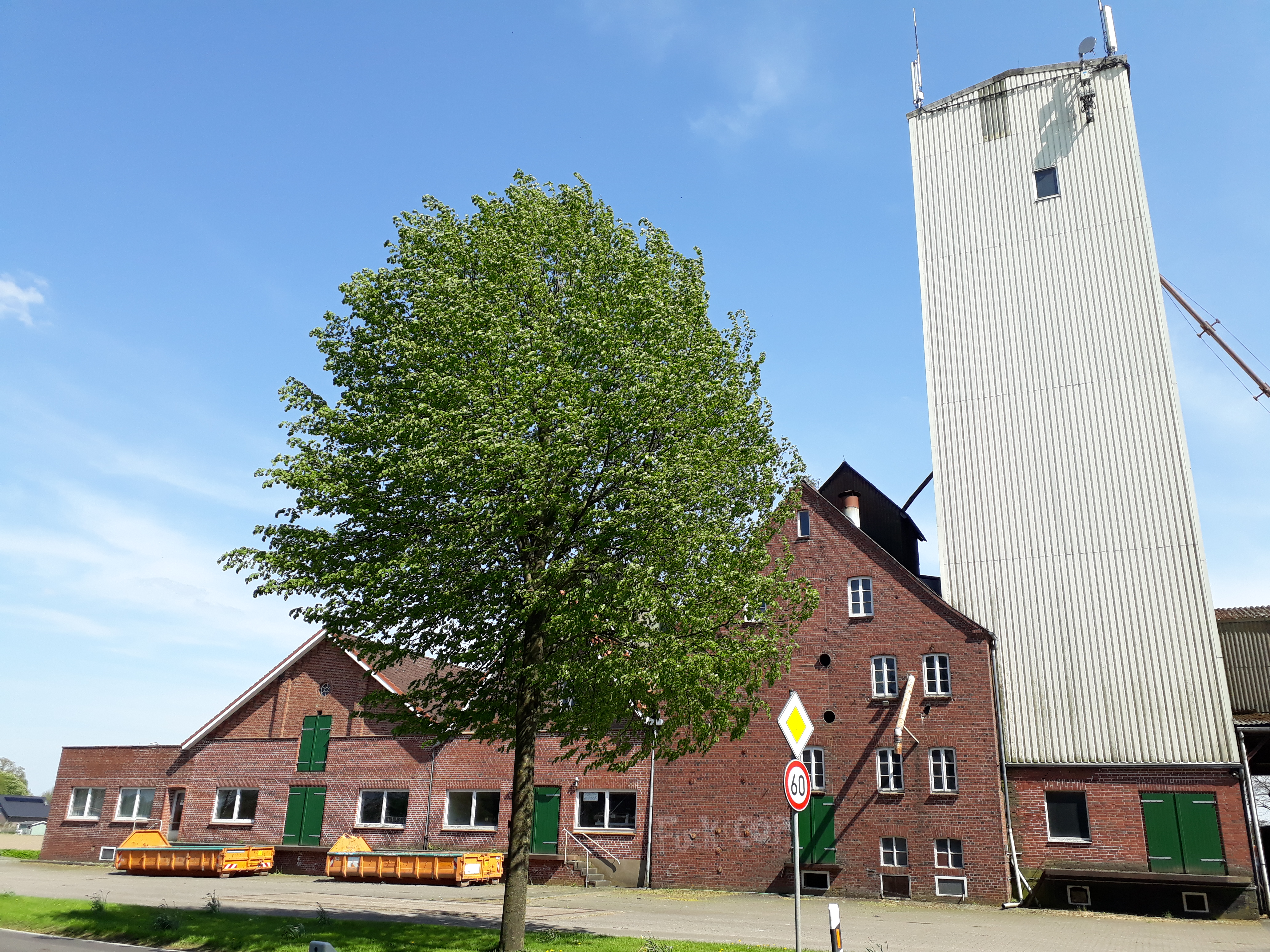 Getreidemühle am Mühlendamm in Bokel, Gemeinde Ahlerstedt, Landkreis Stade, Niedersachsen.